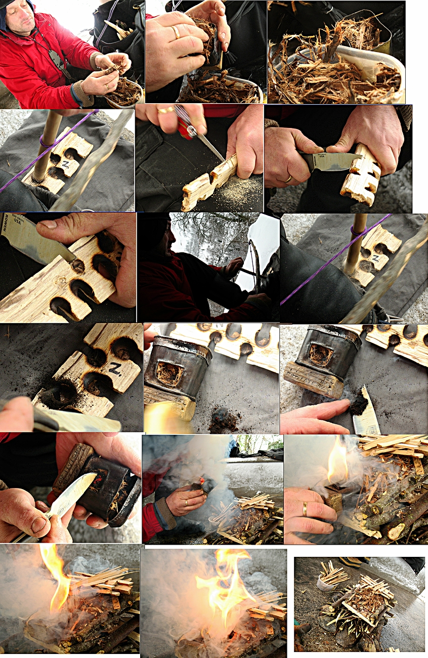 construction de la cheminée Ossaloise et utilisation, c'est une cupule avec cheminée pour le feu par friction à l'archet traditionnelle du XIII e siècle dans la vallée d'Ossau Pyrénées